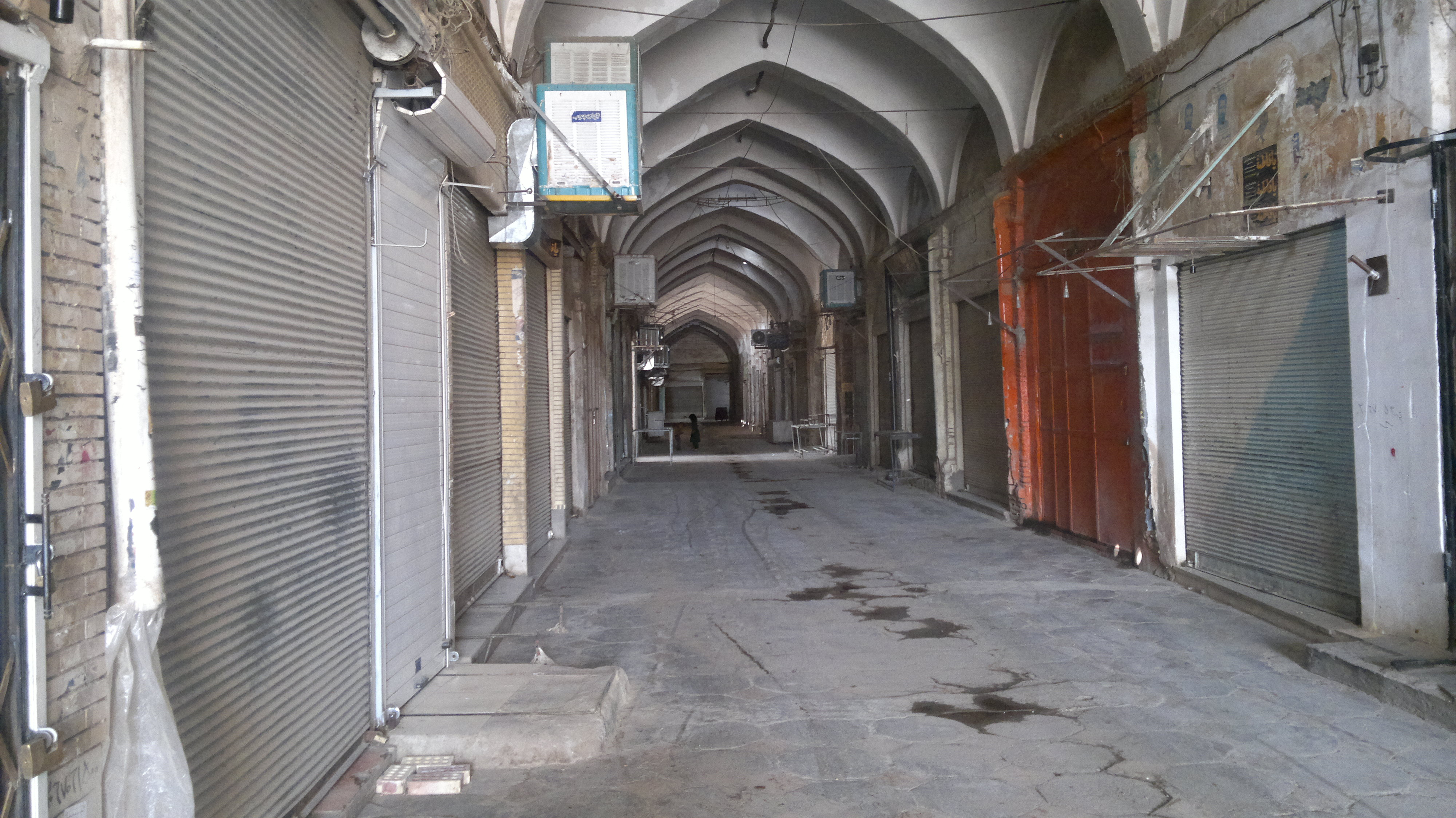 بازار کهنهٔ سیرجان در صبح یک روز تعطیل